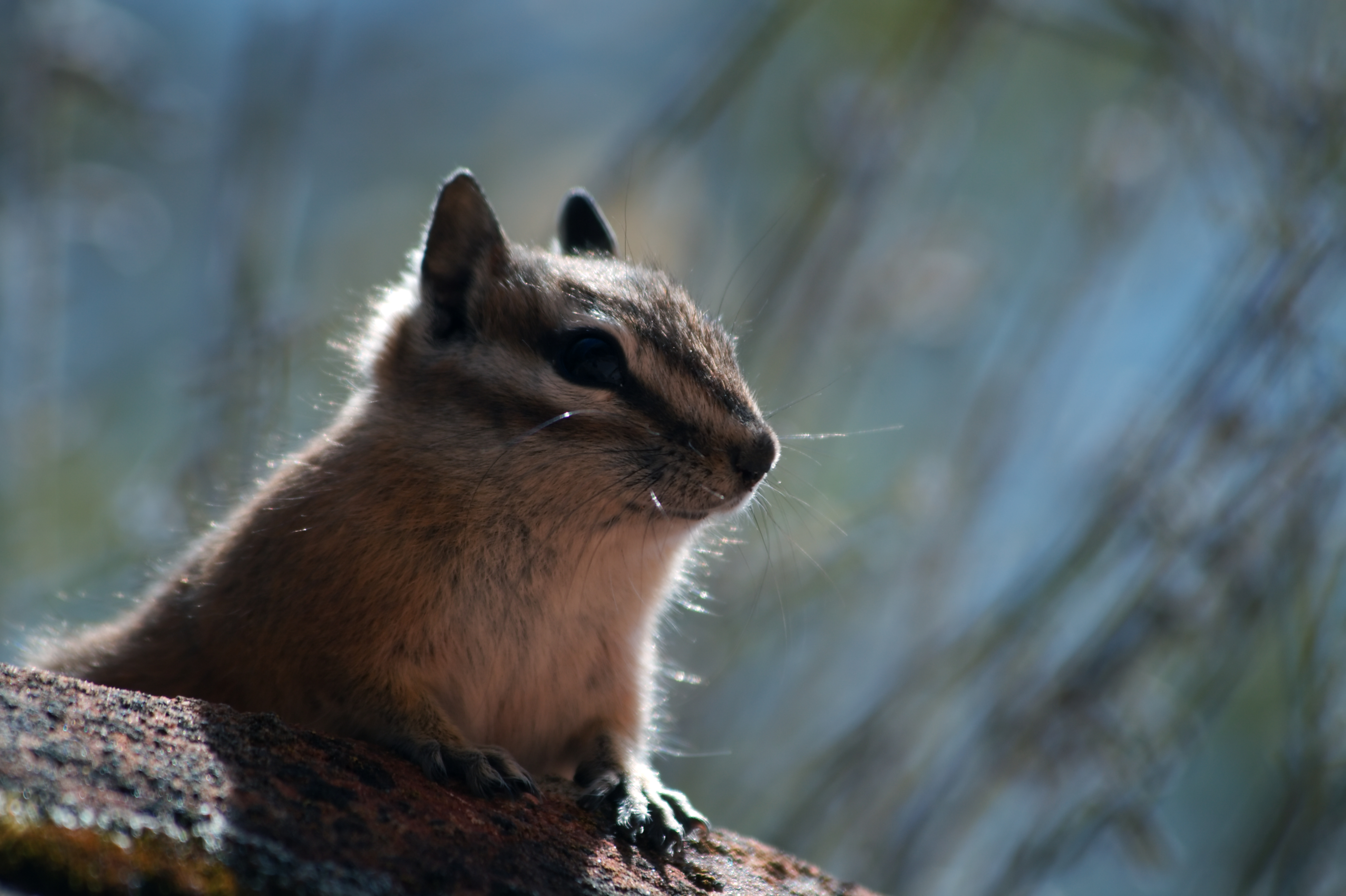 Tamias dorsalis